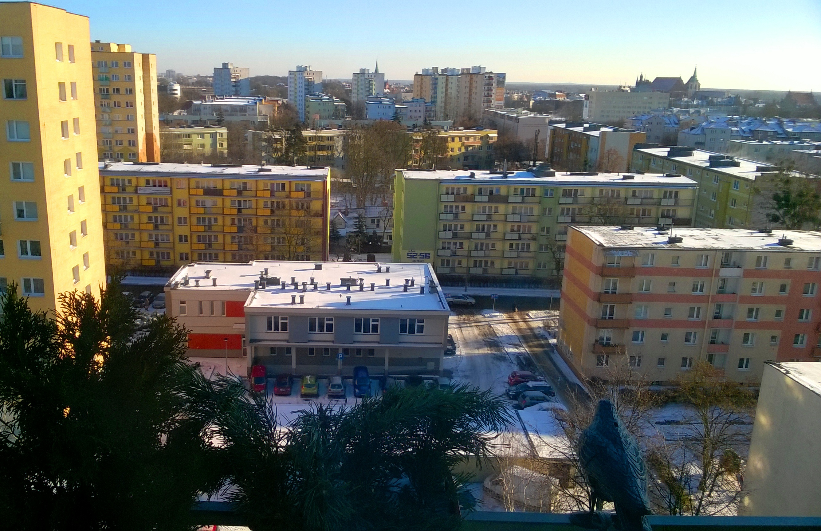 Młodzieżowa Spółdzielnia Mieszkaniowa w Toruniu